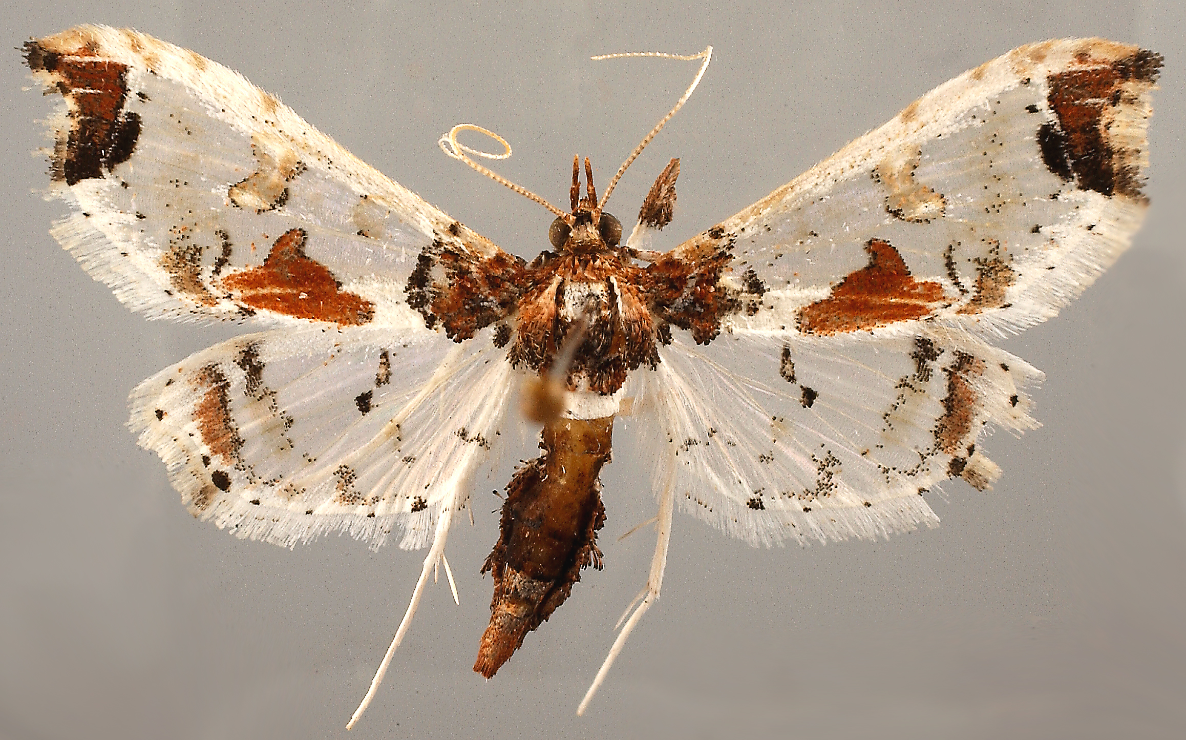 Neoleucinodes elegantalis